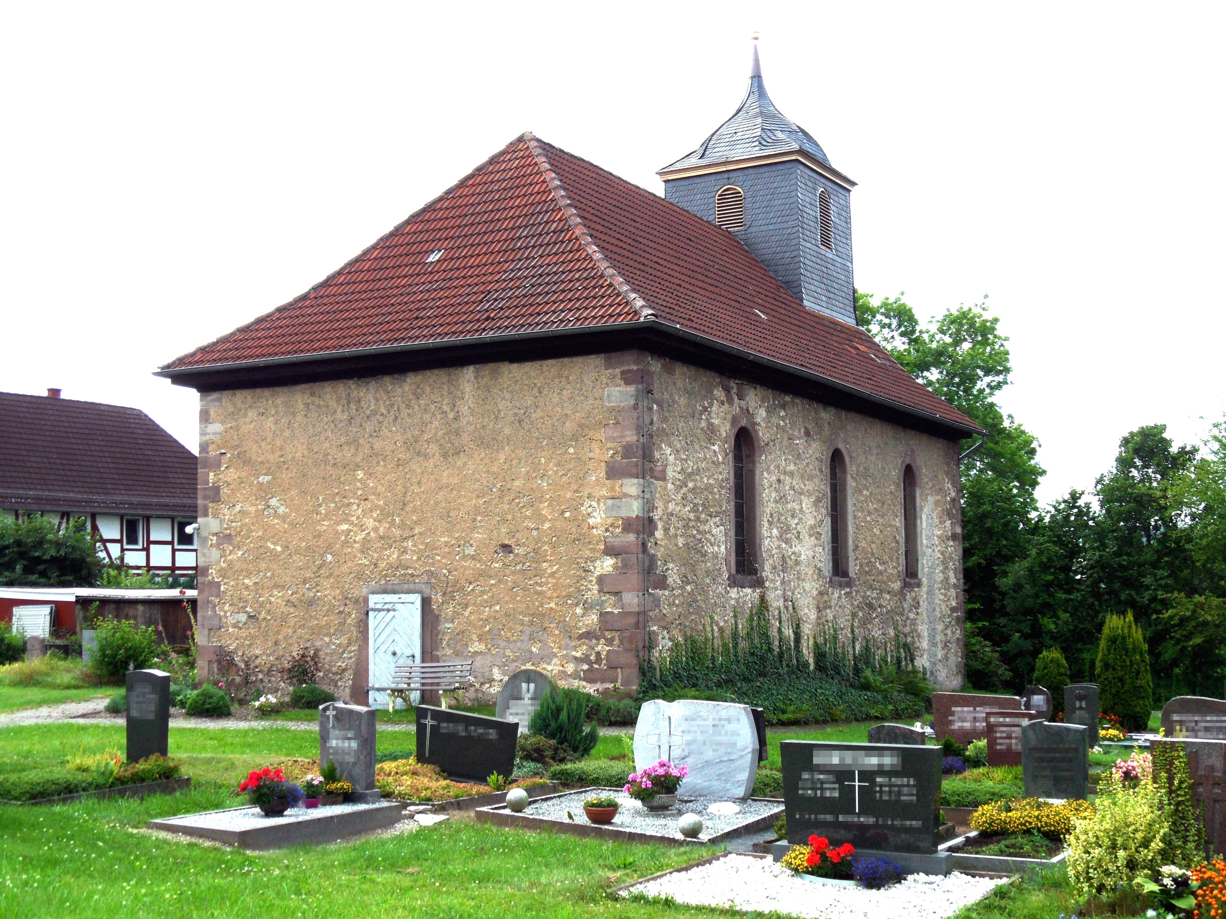 Evangelische Kirche St. Bonifatius in Friedland-Stockhausen mit Friedhof